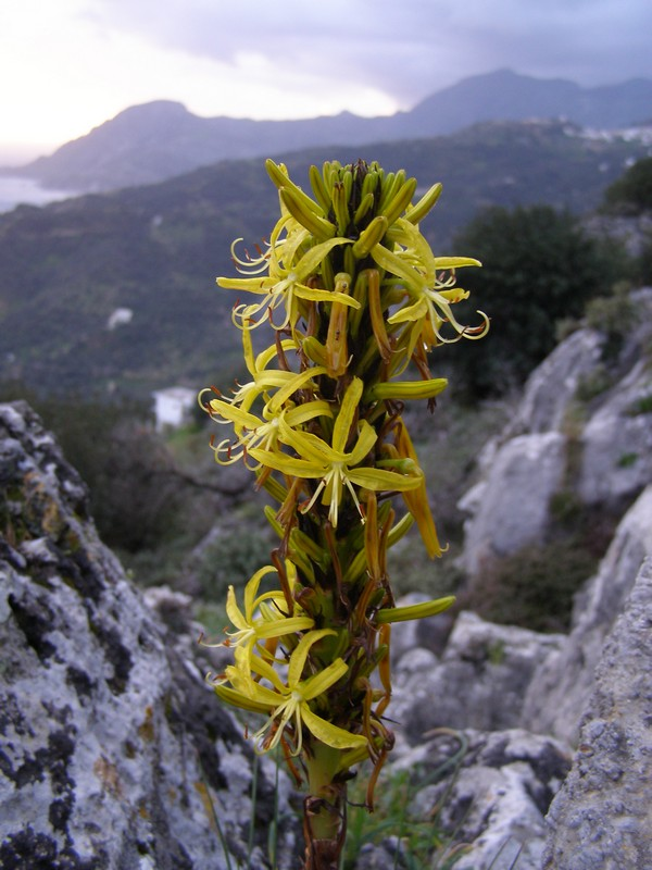 Gelber Affodill (Asphodeline lutea), Kreta